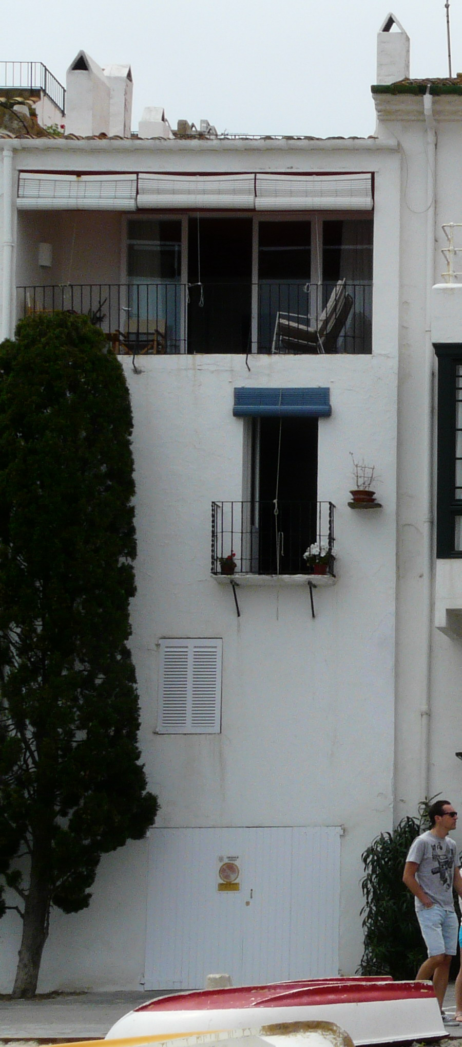 Casa Villavecchia (Cadaqués)